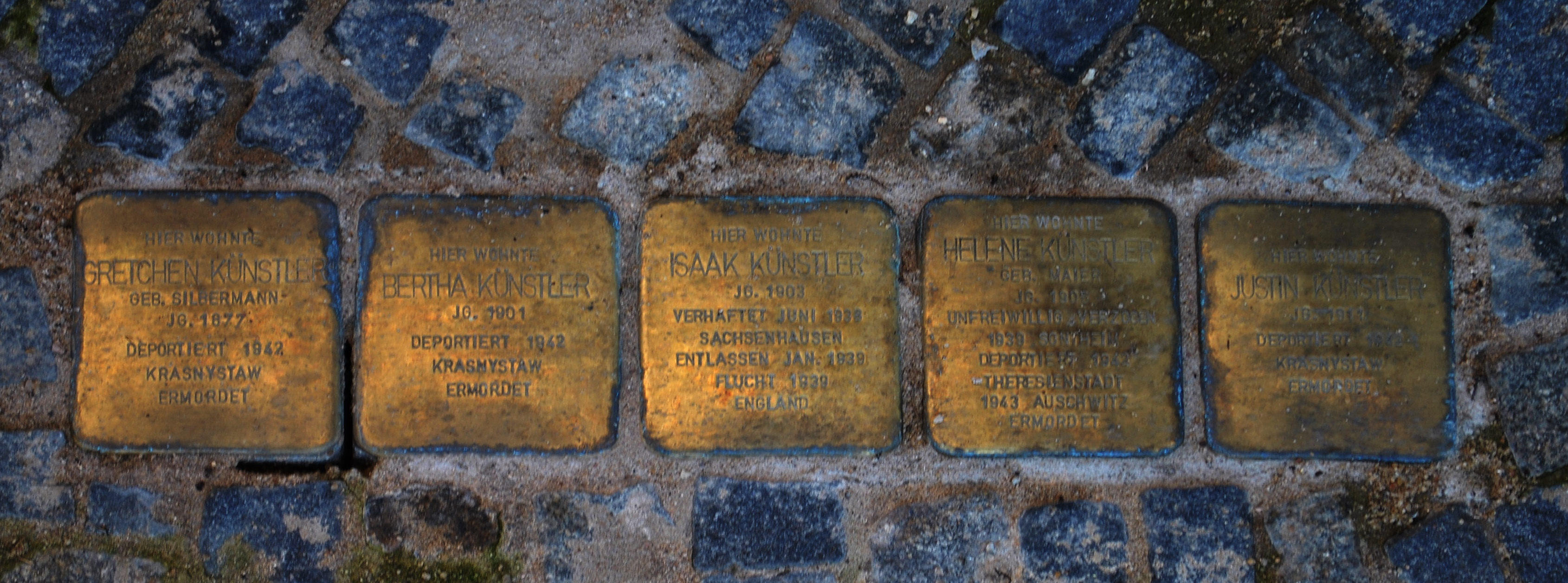 Stolpersteine, Karlsplatz 9, Prichsenstadt